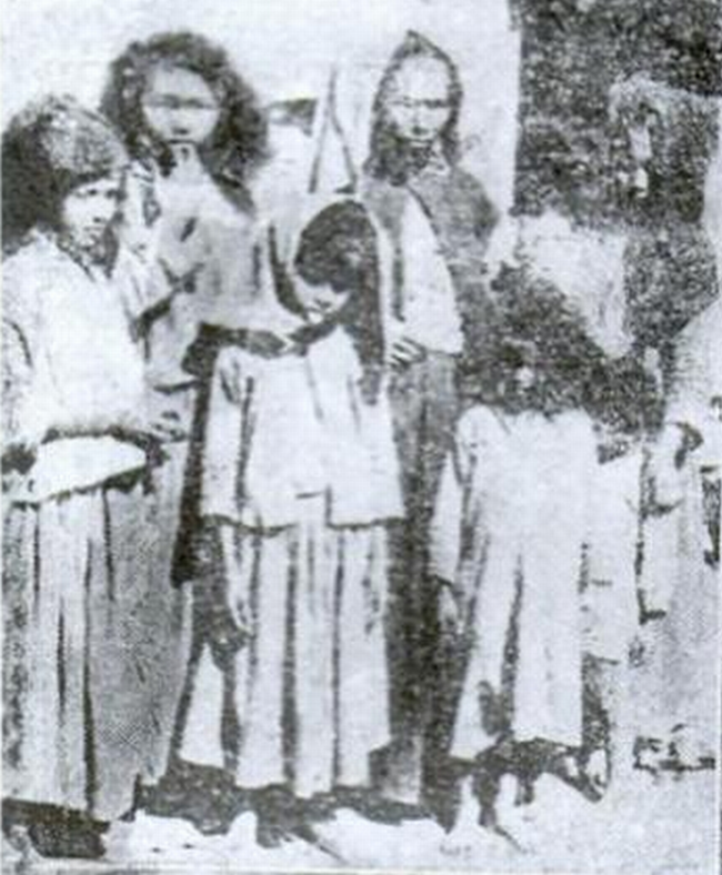 Irmã e sobrinhos de José Senhorinho, chefe supremo dos fanáticos que foi morto em Pau de Colher, Bahia, 1938